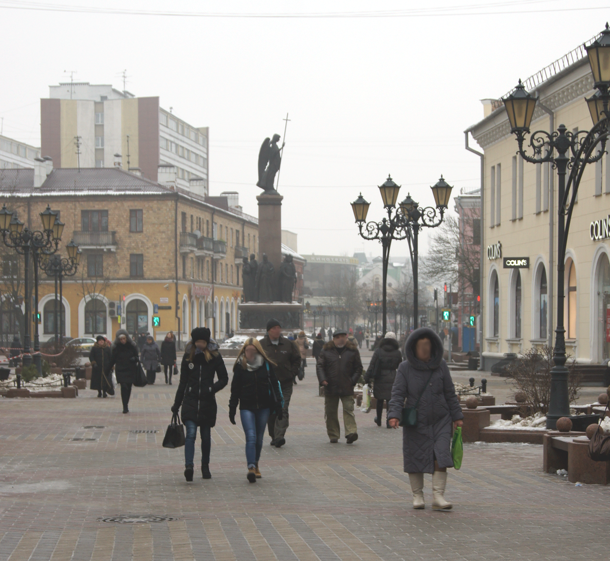 Вуліца Савецкая, студзень-2017. Адна з вуліц у цэнтральнай часцы горада. Пешаходная.